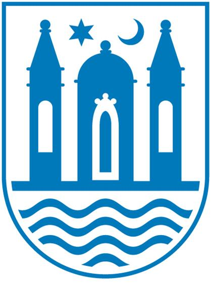 Shield of Svendborg Municipality (2007)